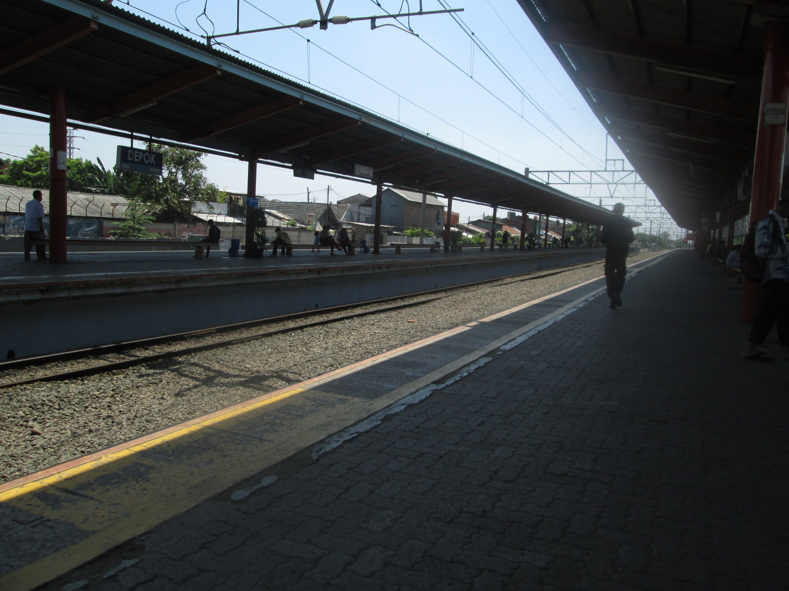 Stasiun Depok